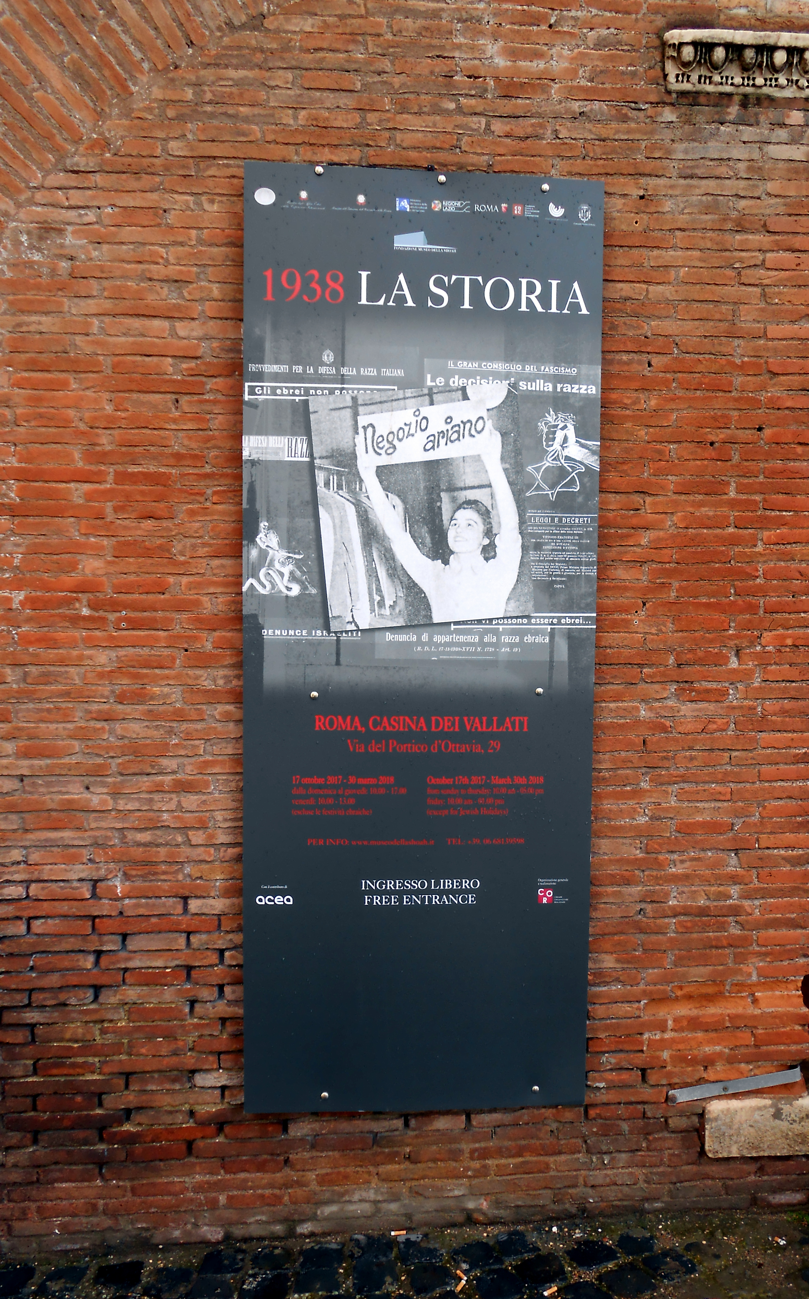 La Mostra sulle Leggi razziali fasciste allestita nel 2017 e 2018 dal titolo: 1938 LA STORIA - Casina dei Vallati - Roma